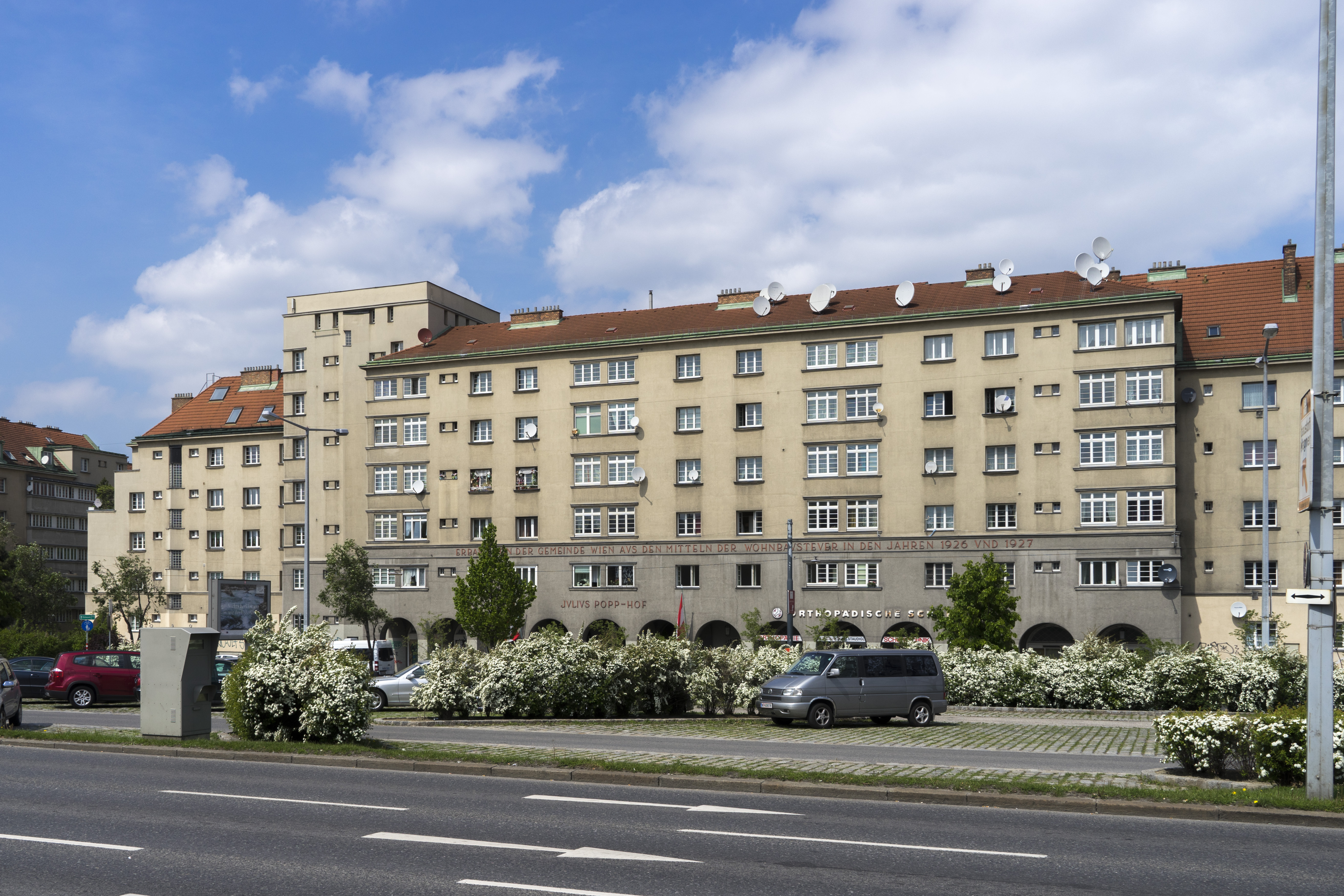 Julius-Popp-Hof This media shows the Vienna residential building (Gemeindebau) with the ID 94. Object location48° 10′ 50.03″ N, 16° 21′ 07.77″ E